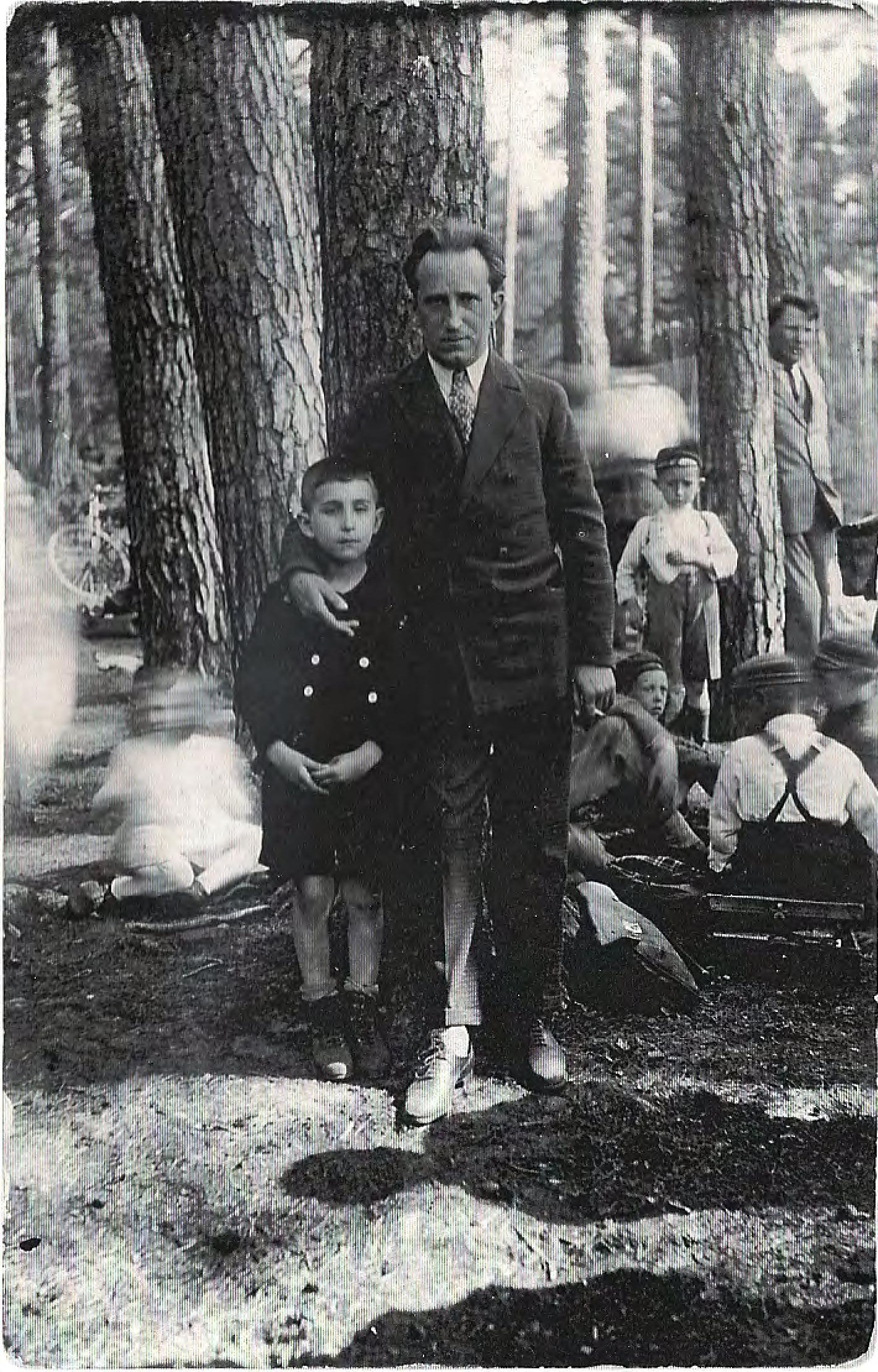 המנהל צמח פלדשטיין עם בנו הצעיר יהושע, ל"ג בעומר בגימנסיה הריאלית העברית בקובנה, בקולוטובה